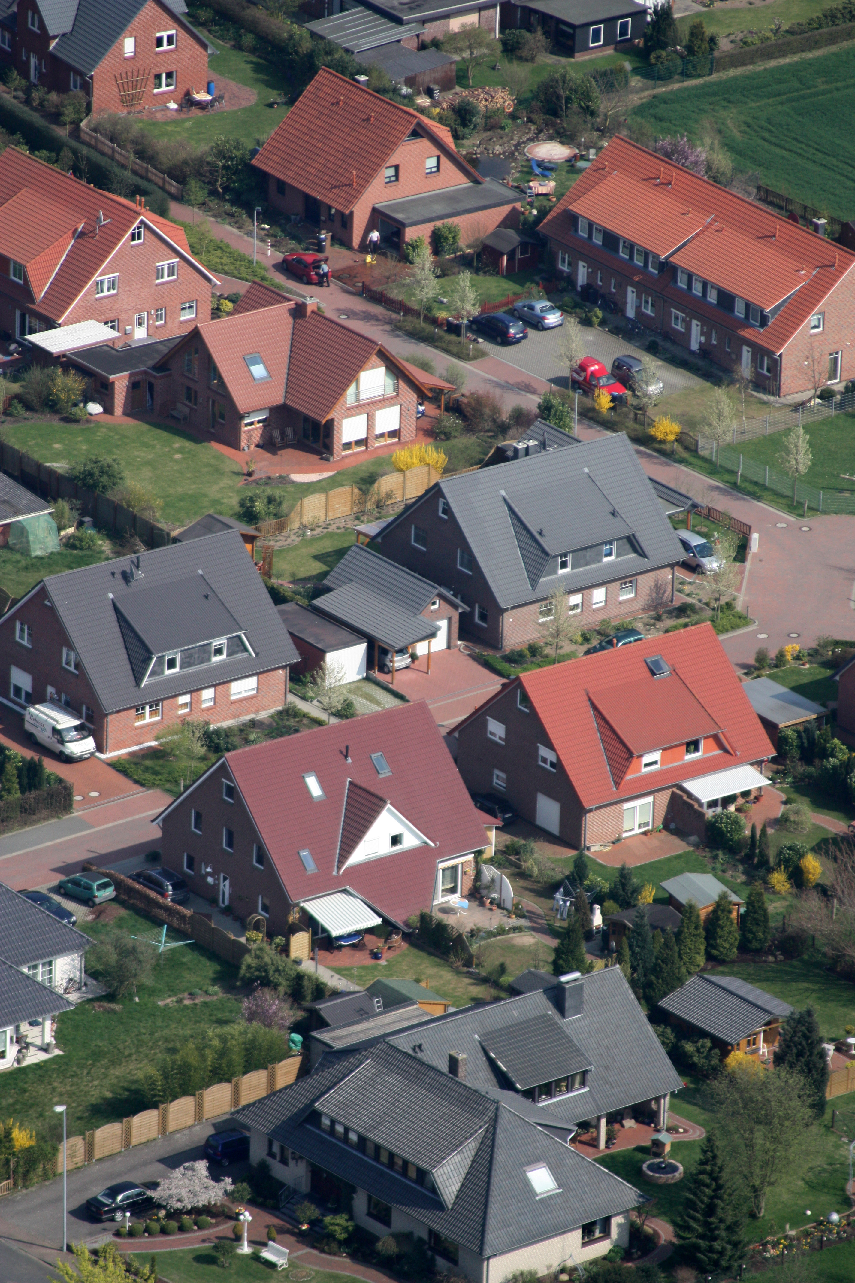 Syke, Landkreis Diepholz, Niedersachsen; Luftbilder